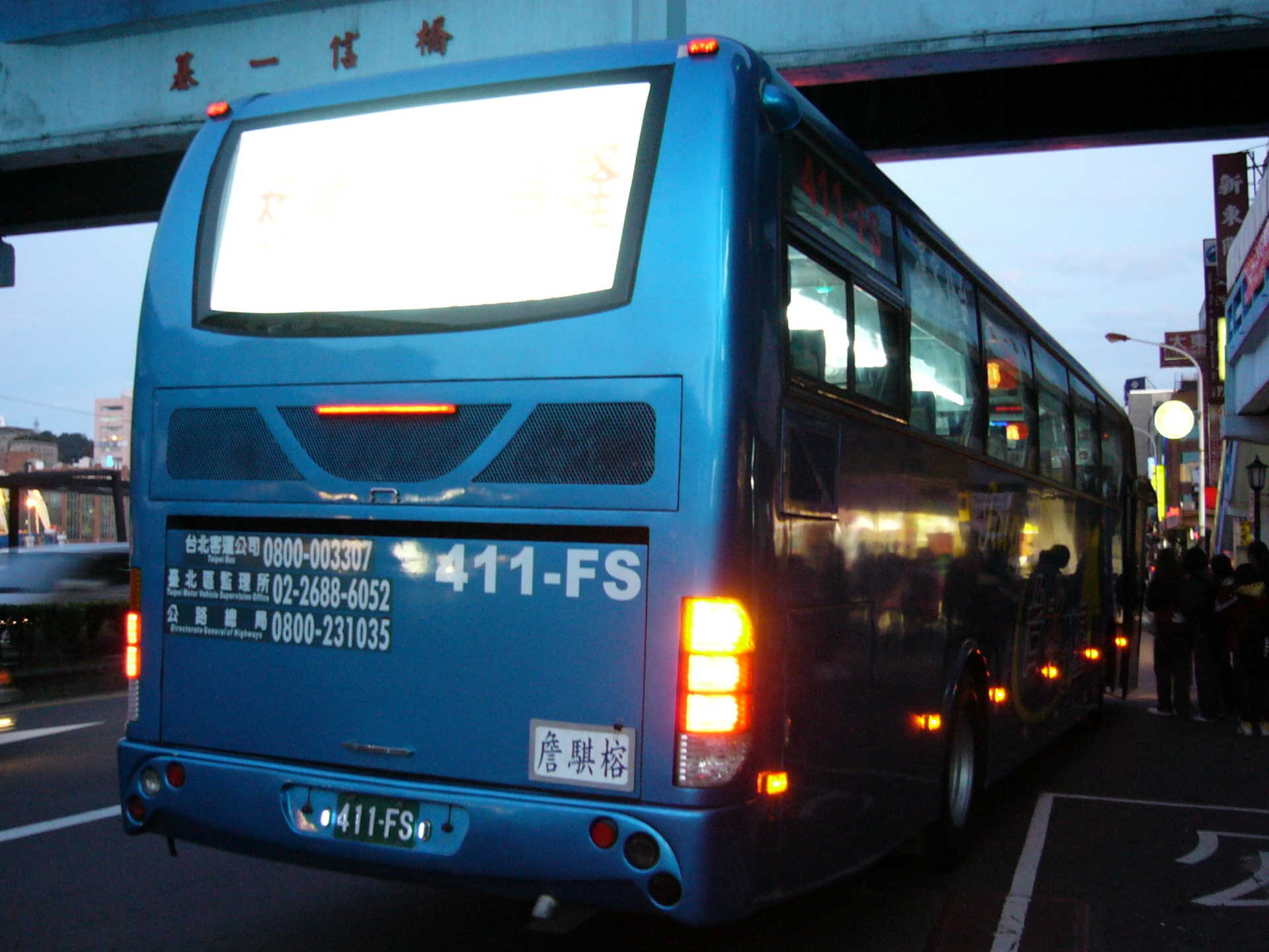 傍晚的台北客運台北之星411-FS右後方外觀